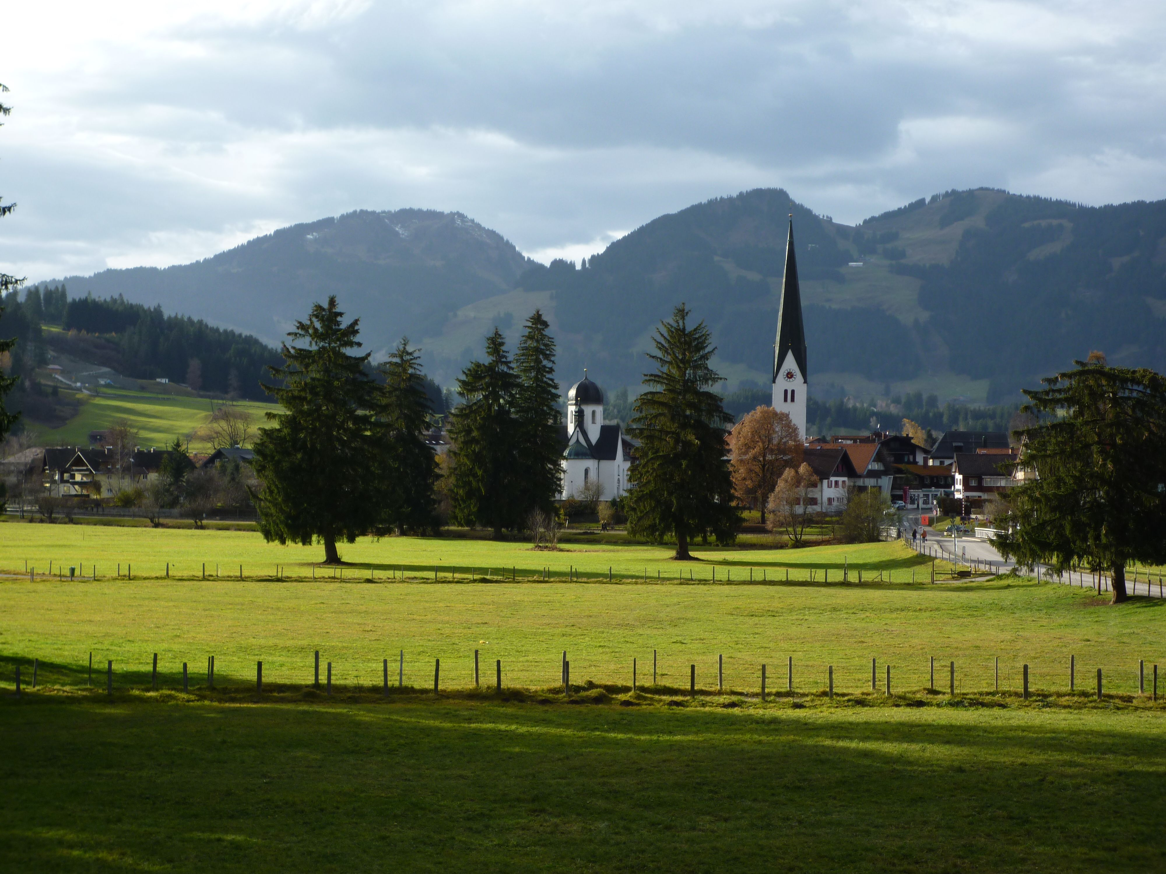 Fischen - Kirche mit Hörnergruppe